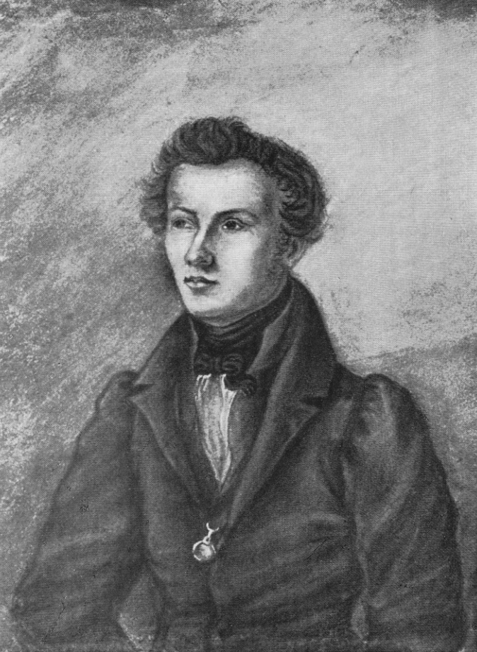 Bruno Bauer, deutscher Theologe, Bibelkritiker, Philosoph und Historiker